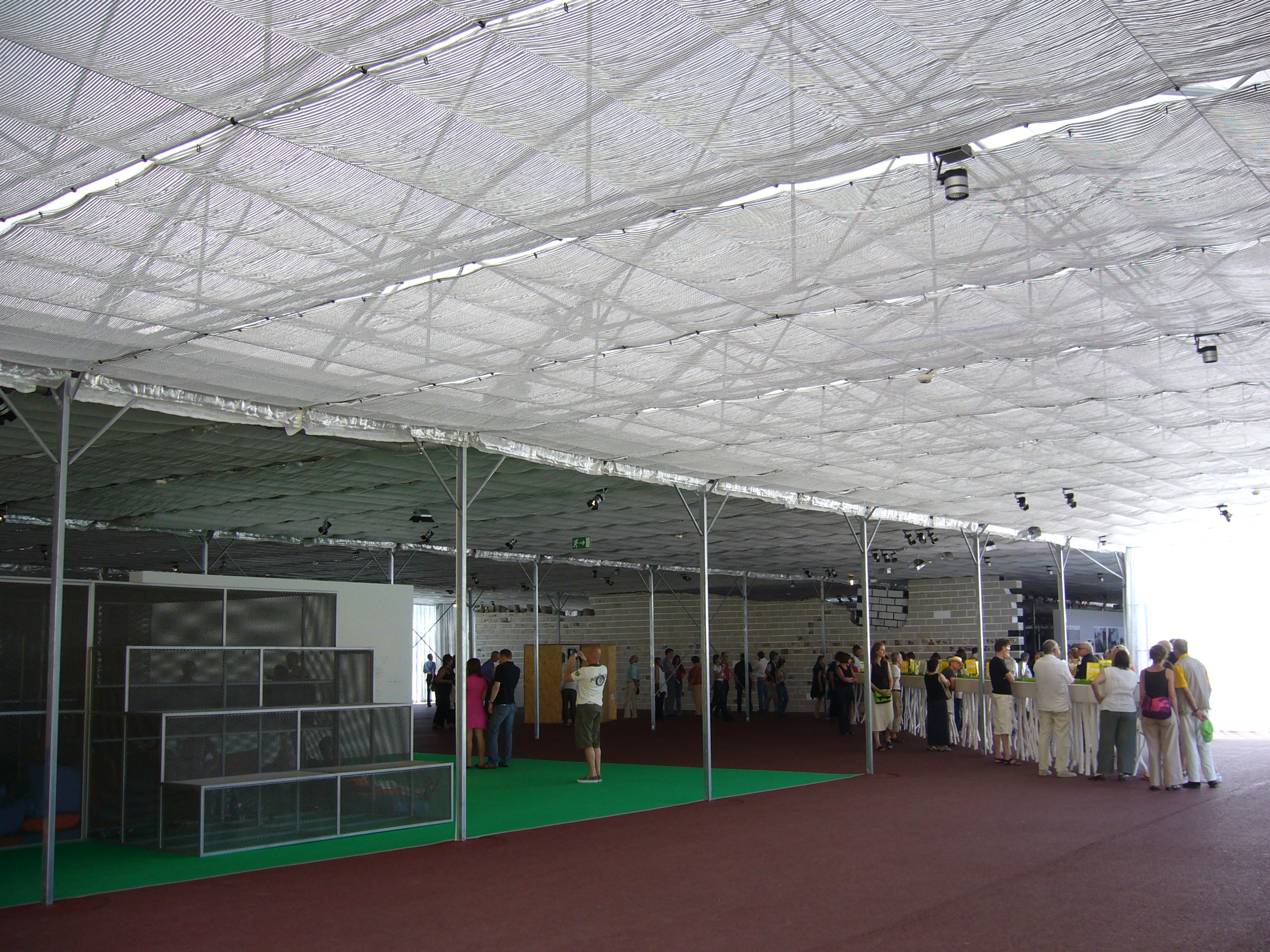 Aue-Pavillon auf der documenta 12 in Kassel (Innenansicht)